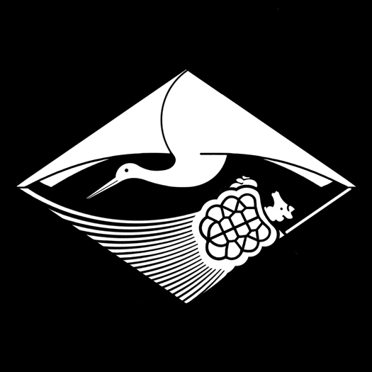 「向い亀鶴菱」紋（染抜）